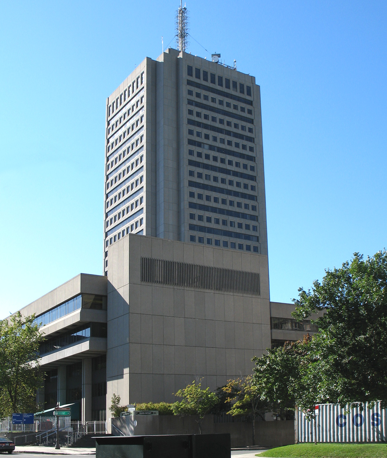 Édifice Marie-Guyart, Québec (ville)